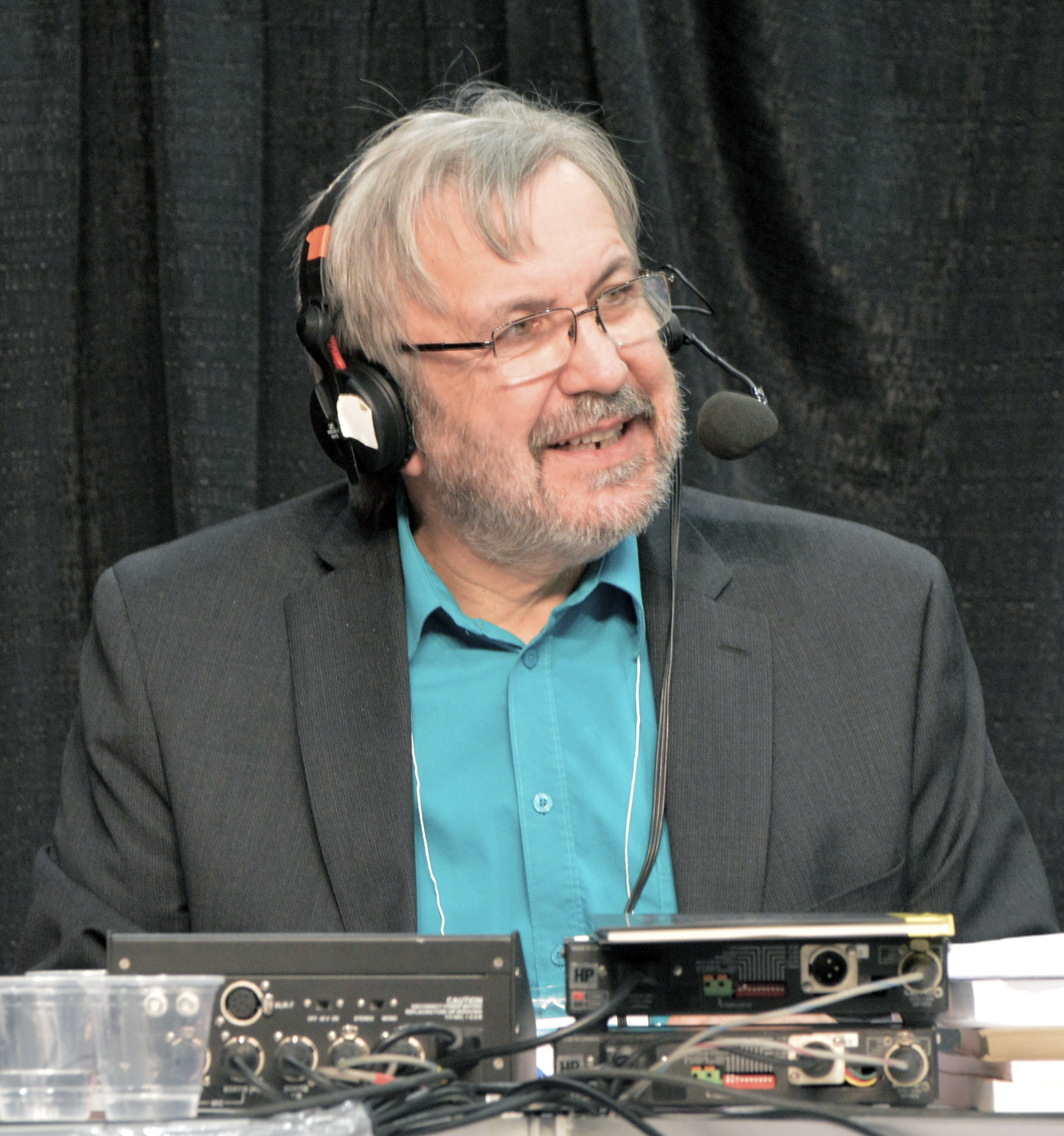 Yanick Villedieu animant une émission Les années lumière au Salon international du livre de Québec 2015